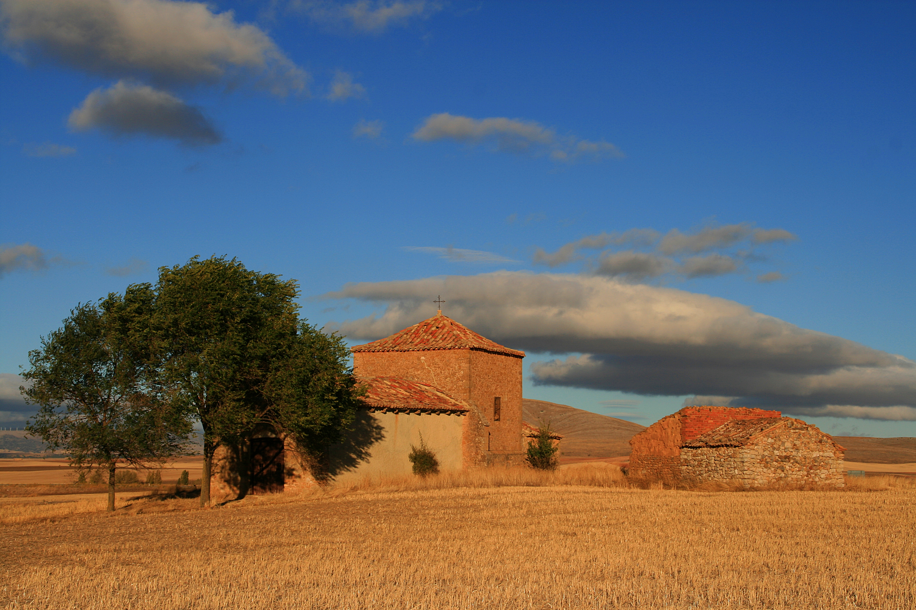 Feliz día todas las Pilares.Y en especial a mi madre.